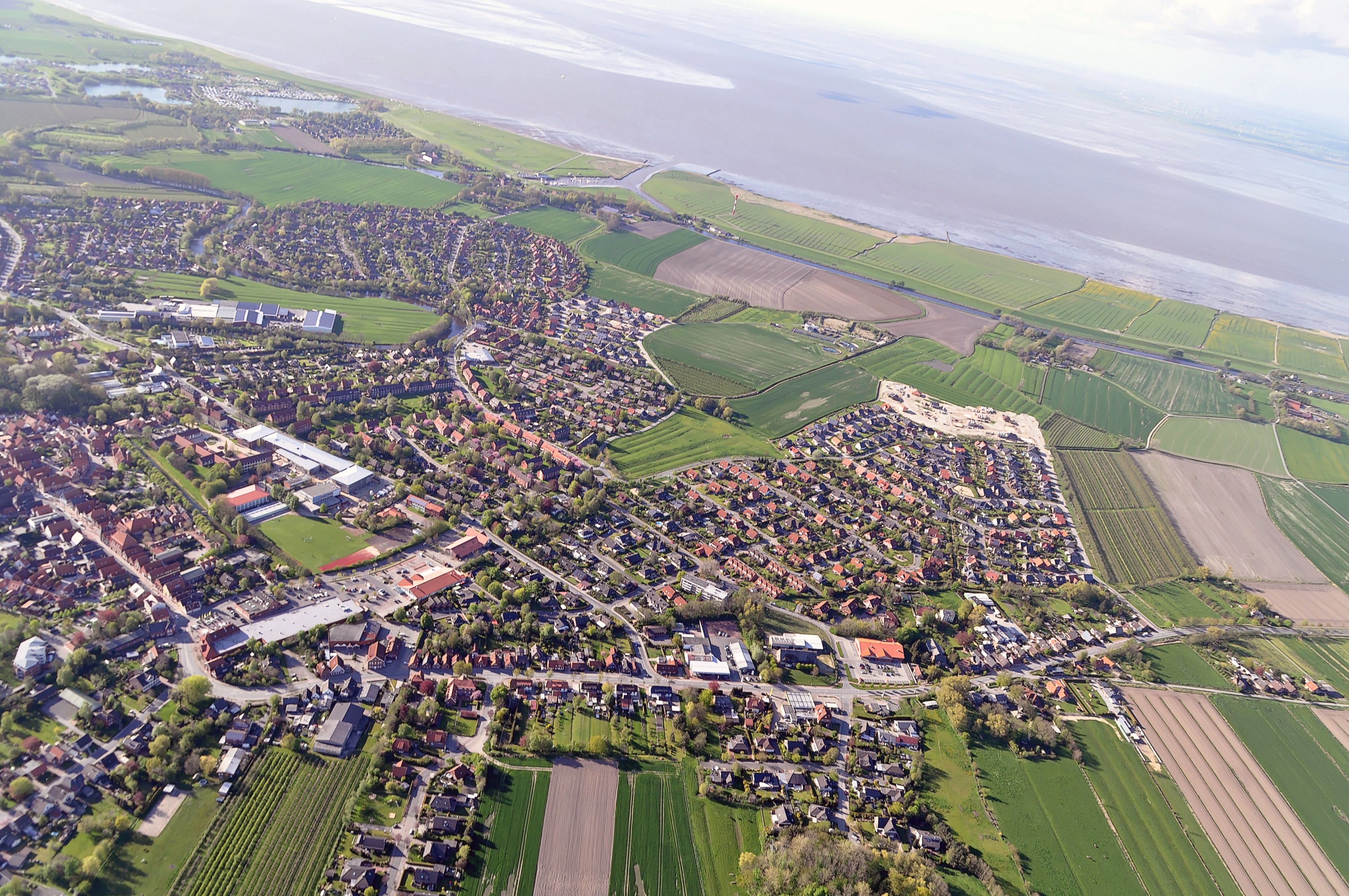 Luftbilder von der Nordseeküste 2012-05